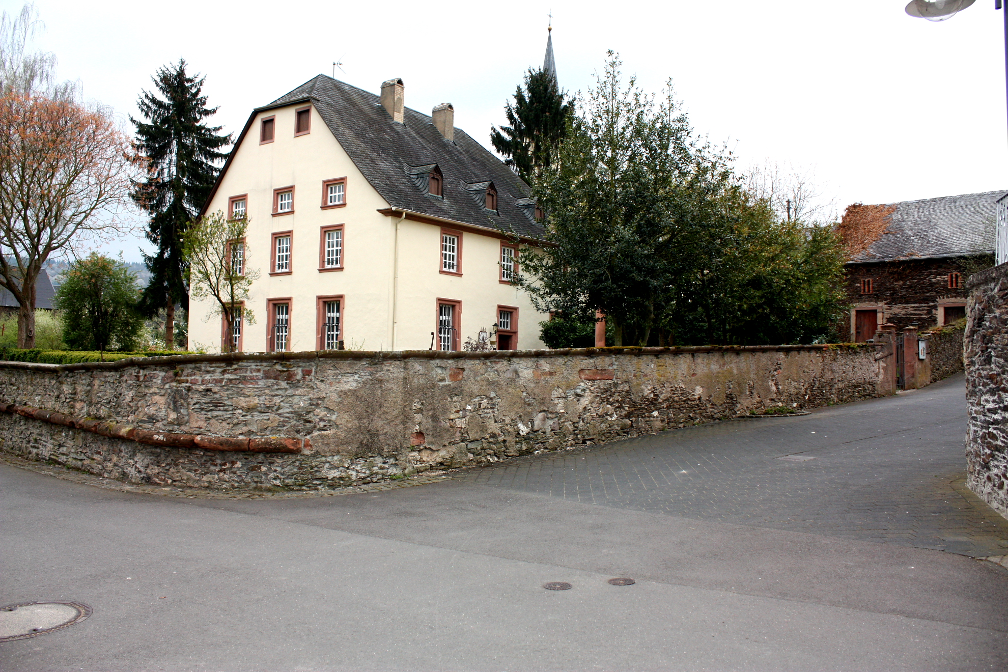 1684 Zum Wohnhaus umgebautes ehemaliges Kelterhaus der Burg Lösnich